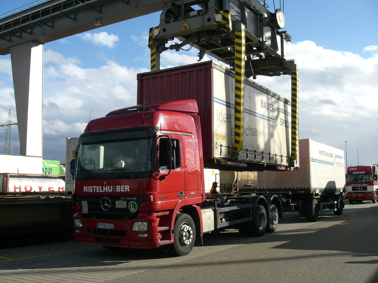 Ristelhueber Kombiverkehr